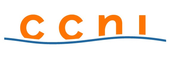 Logotipo Compañía Chilena de Navegación Interoceánica